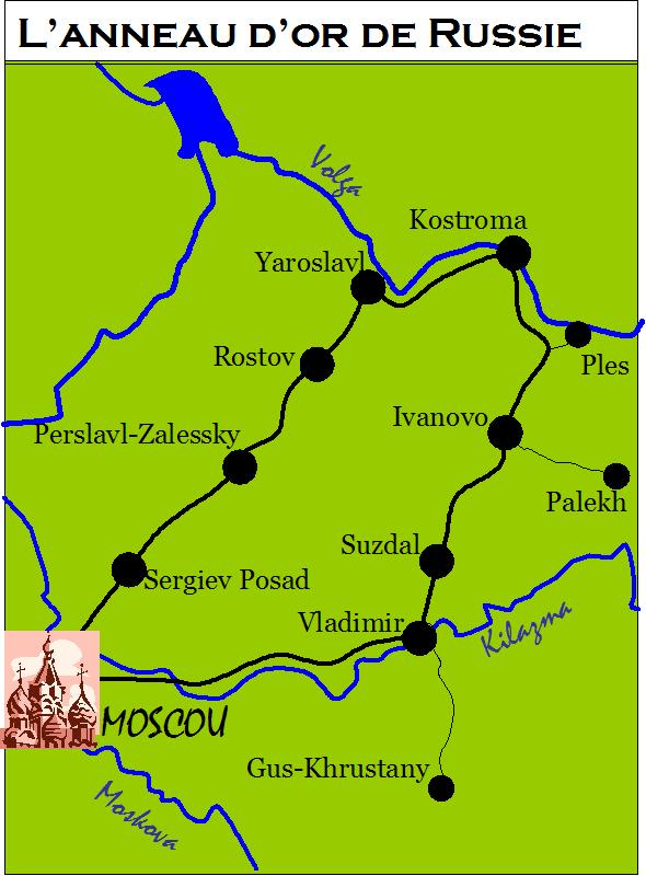 Carte Anneau d'or Auteur GD 25 octobre 2006